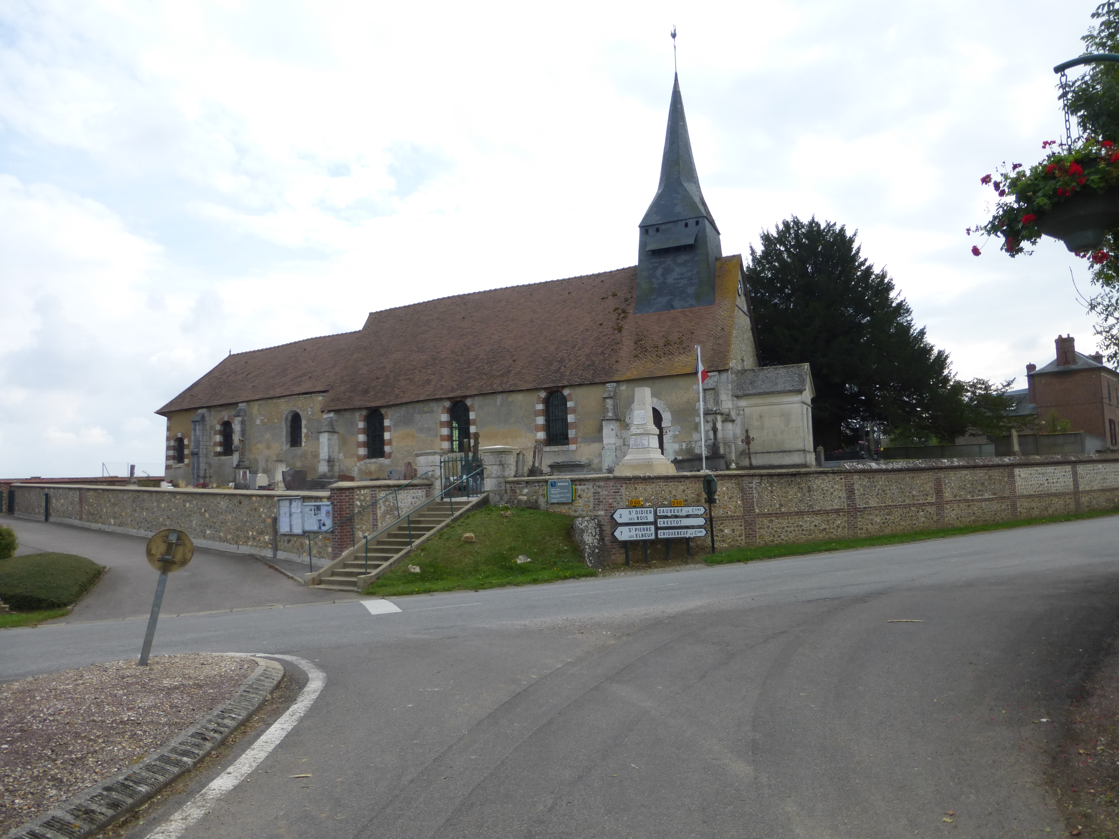 MANDEVILLE Eglise